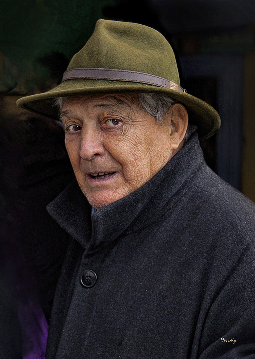 Retrato del pintor Ignacio del Rio con su característica mirada pícara.